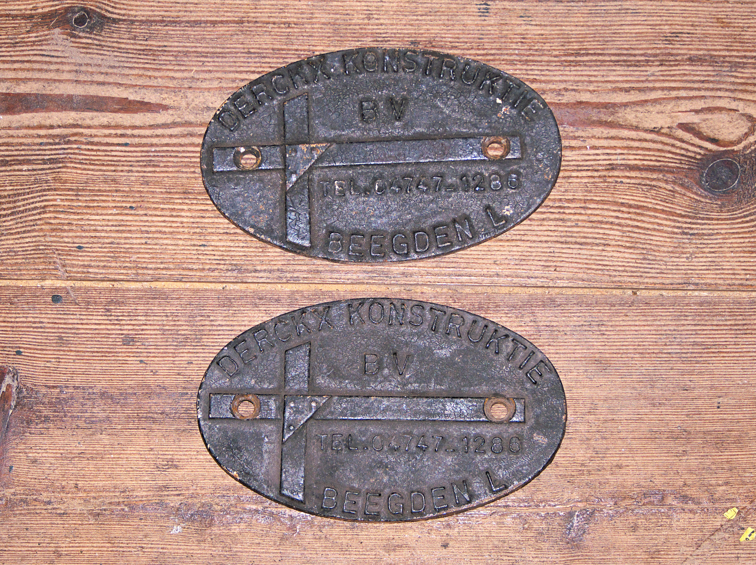 Walderveense molen, roeplaatjes